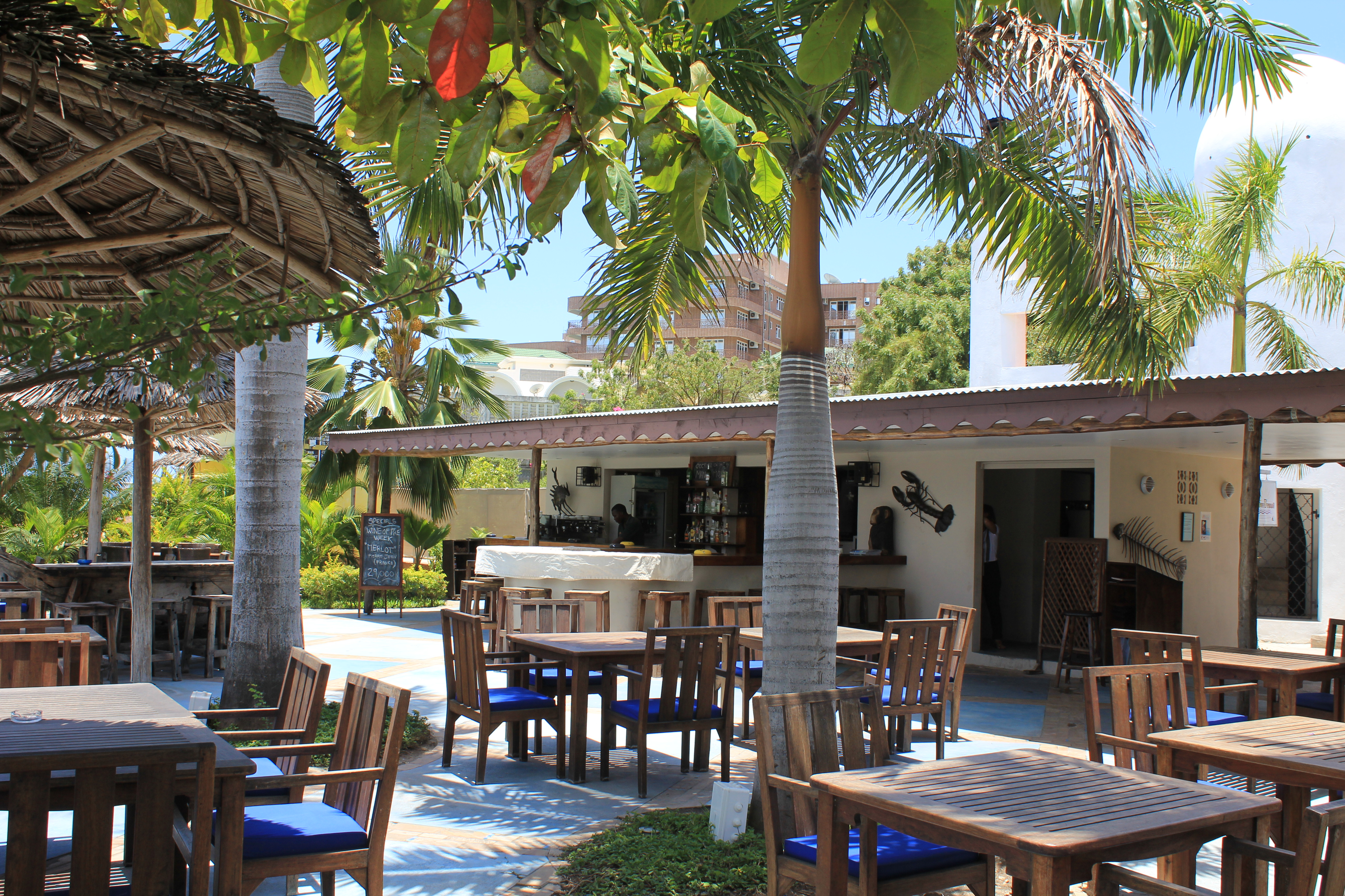 Msasani Peninsula, Dar es Salaam, Tanzania